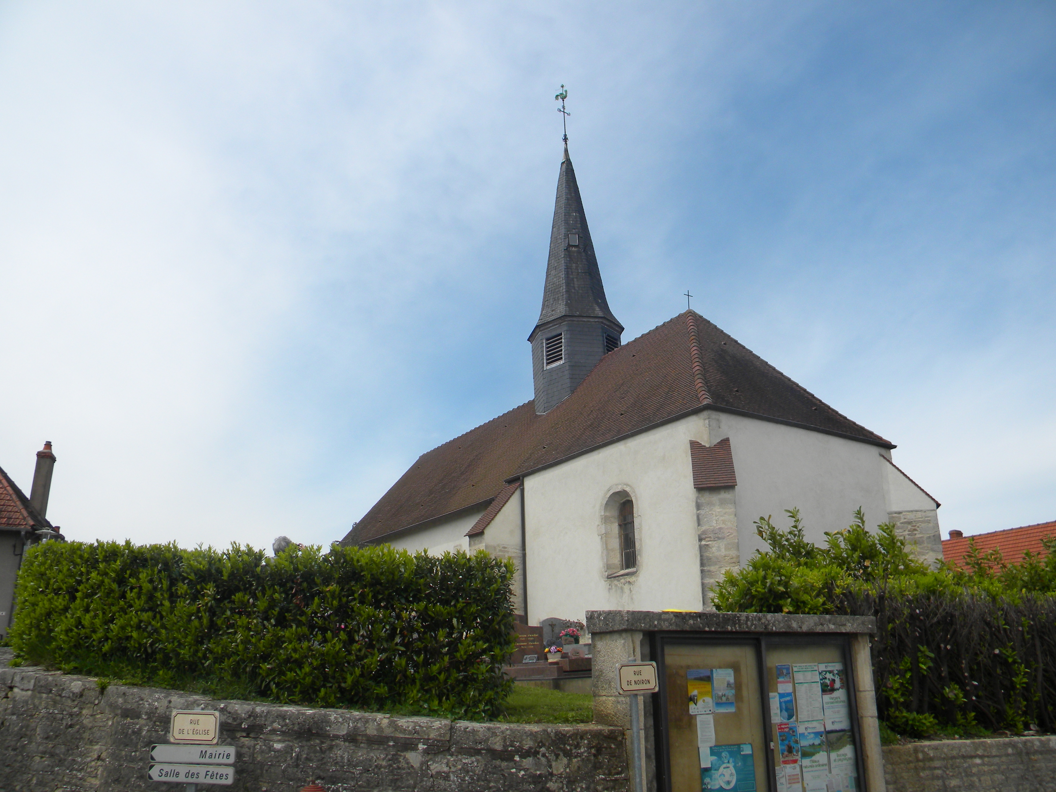 Savouges